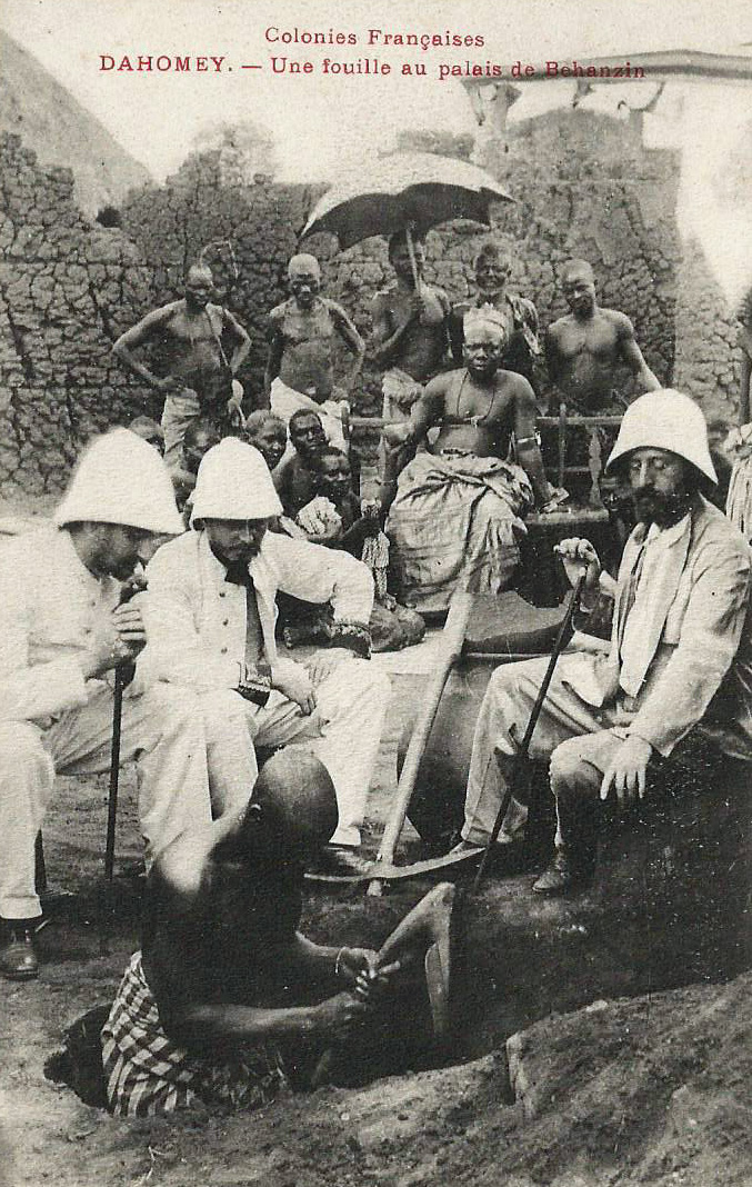 Dahomey. Une fouille au palais de Behanzin. Colonies françaises. Dahomey